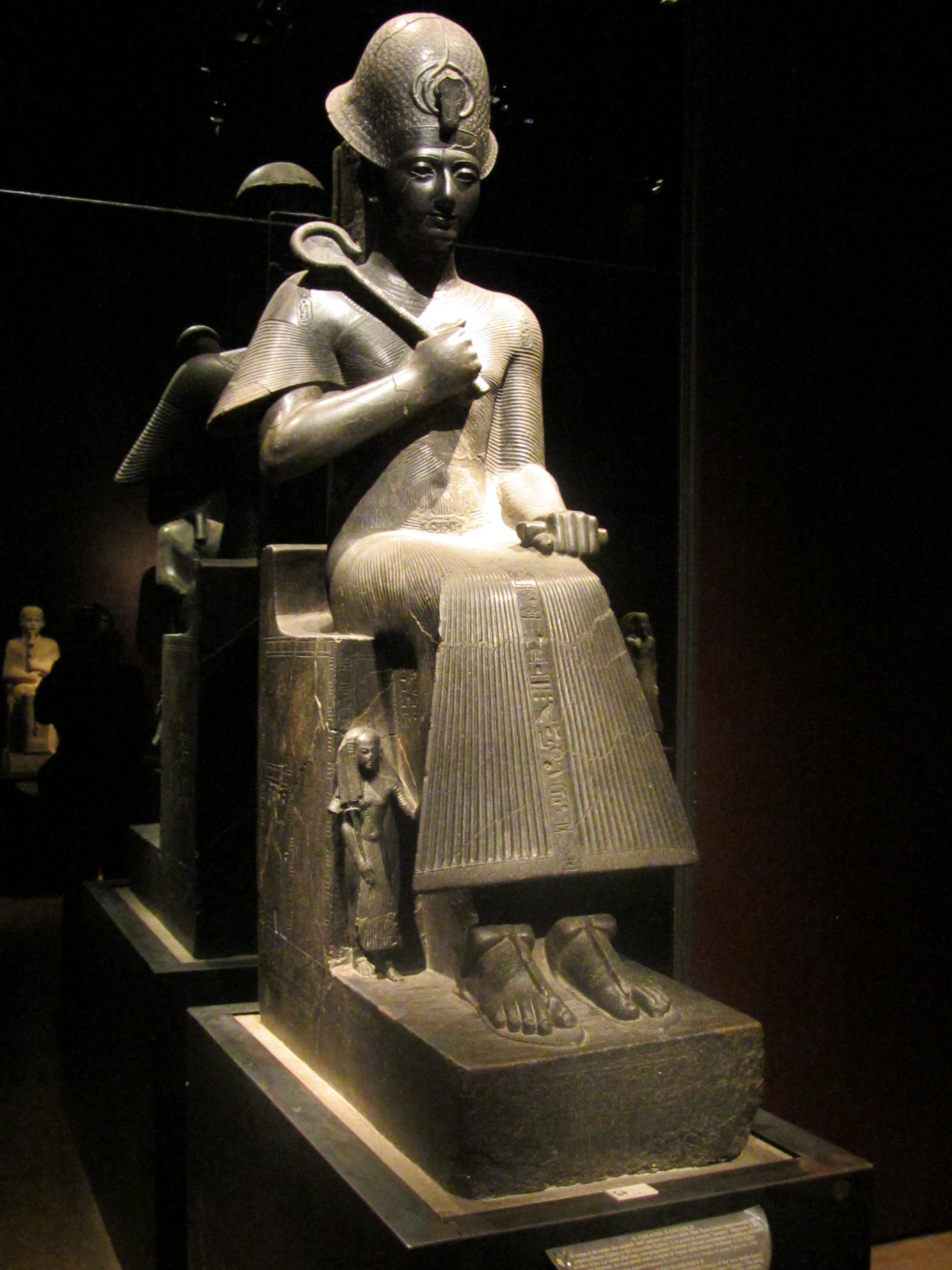 Statua di Ramses II (Torino Museo Egizio parte 2) Diorite Nuovo Regno, XIX dinastia, regno di Ramesse II (1279-1213 a.C.) Provenienza: Tebe, in seguito Collezione Drovetti, 1824 N. Inv. C. 1380 museoegizio.it N. Inv. C. 1380